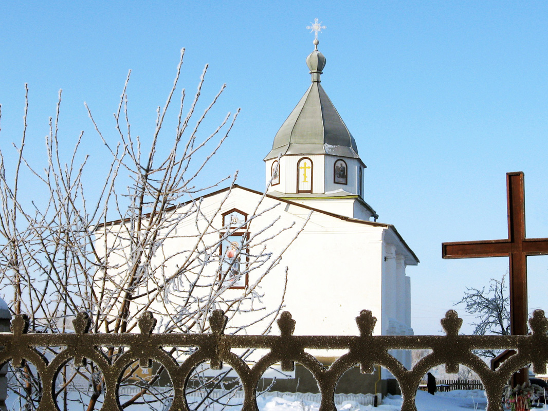 Свято-Троицкая церковь пгт. Лосиновка Нежинского района Черниговской области